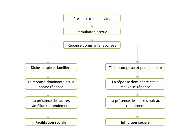 Source : R.B. Zajonc et S.M. Sales (1966). Social facilitation of dominant and subordinate responses. in L. Bédard, J. Déziel et L. Lamarche. Introduction à la psychologie sociale. Vivre, penser et agir avec les autres, ERPI Pearson Education, 2012 Reproduction personnelle.